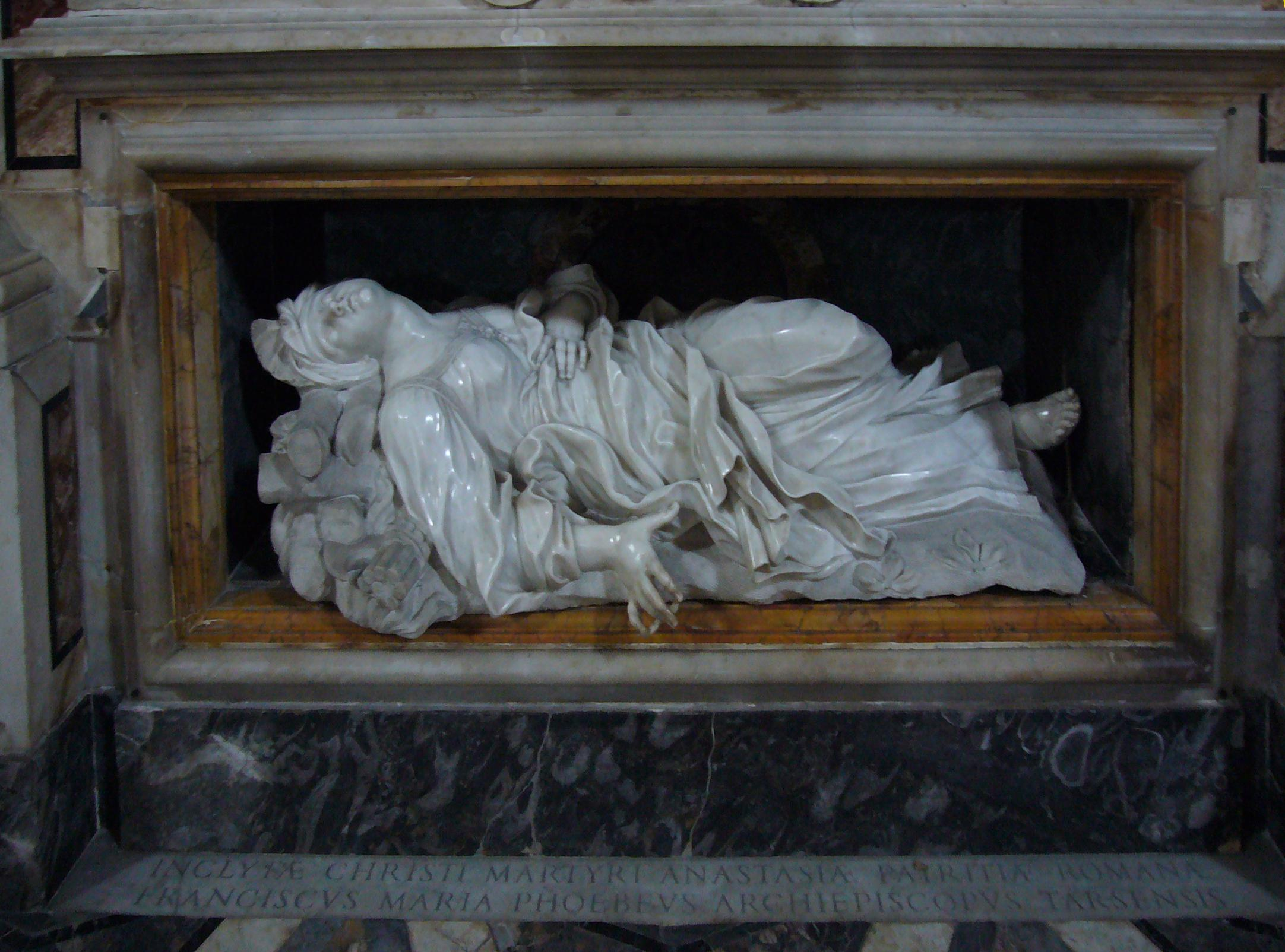 Roma, Sant'Anastasia al Palatino: statua della santa di impronta berniniana (F. Aprile e E. Ferrata, XVII sec.)